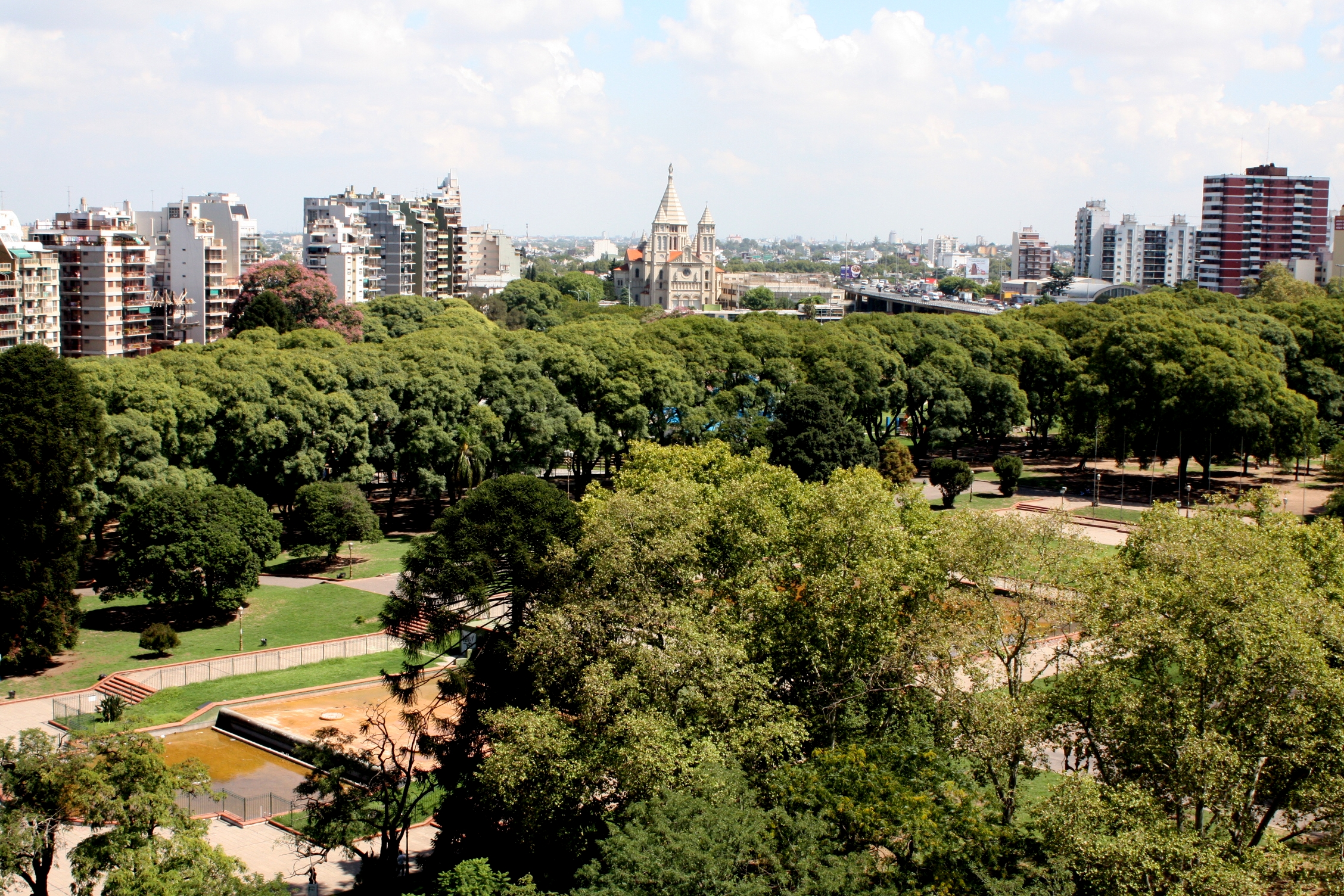 Parque Chacabuco, Buenos Aires.